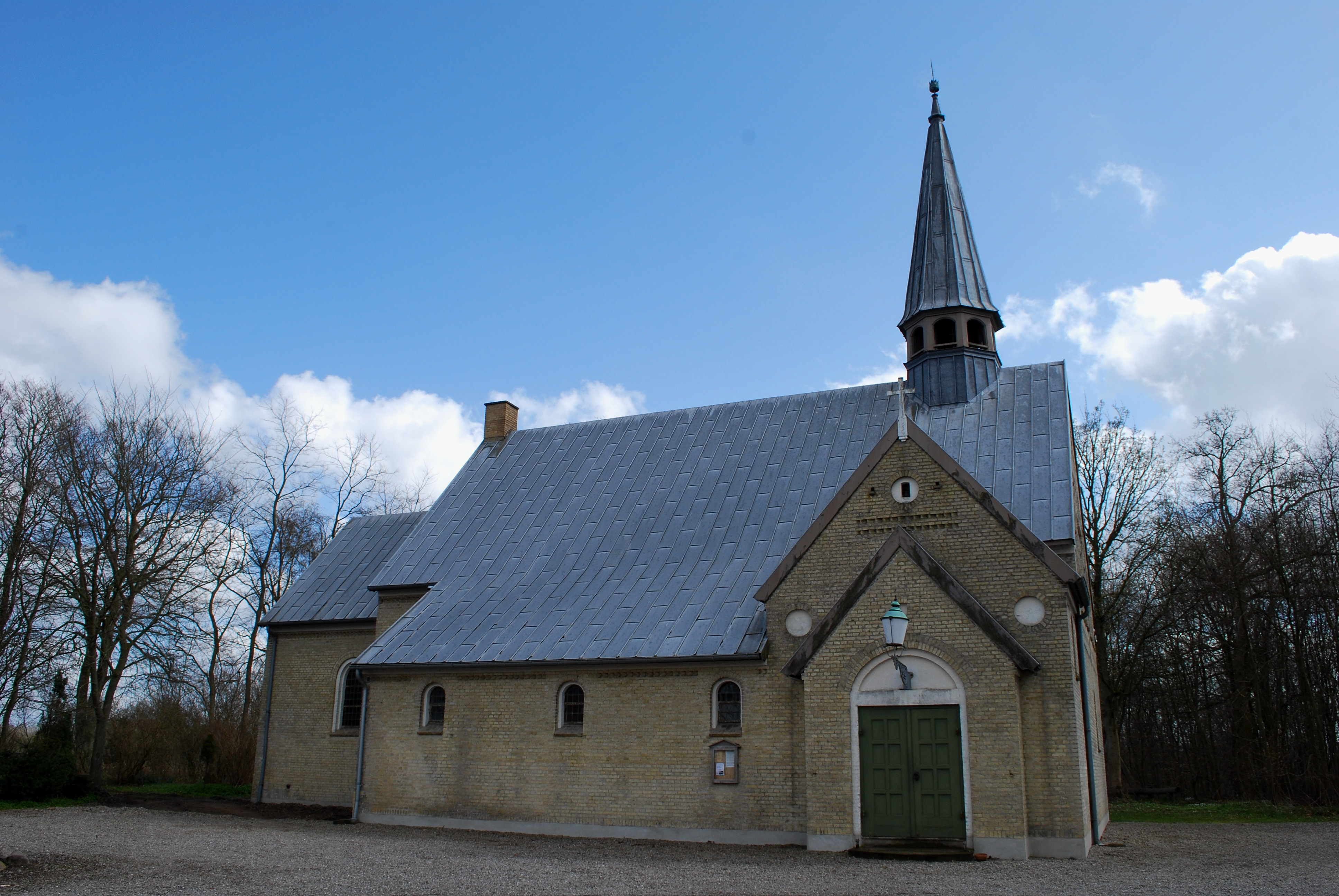 Stenderup Frimenighedskirke, Nybøl, Denmark